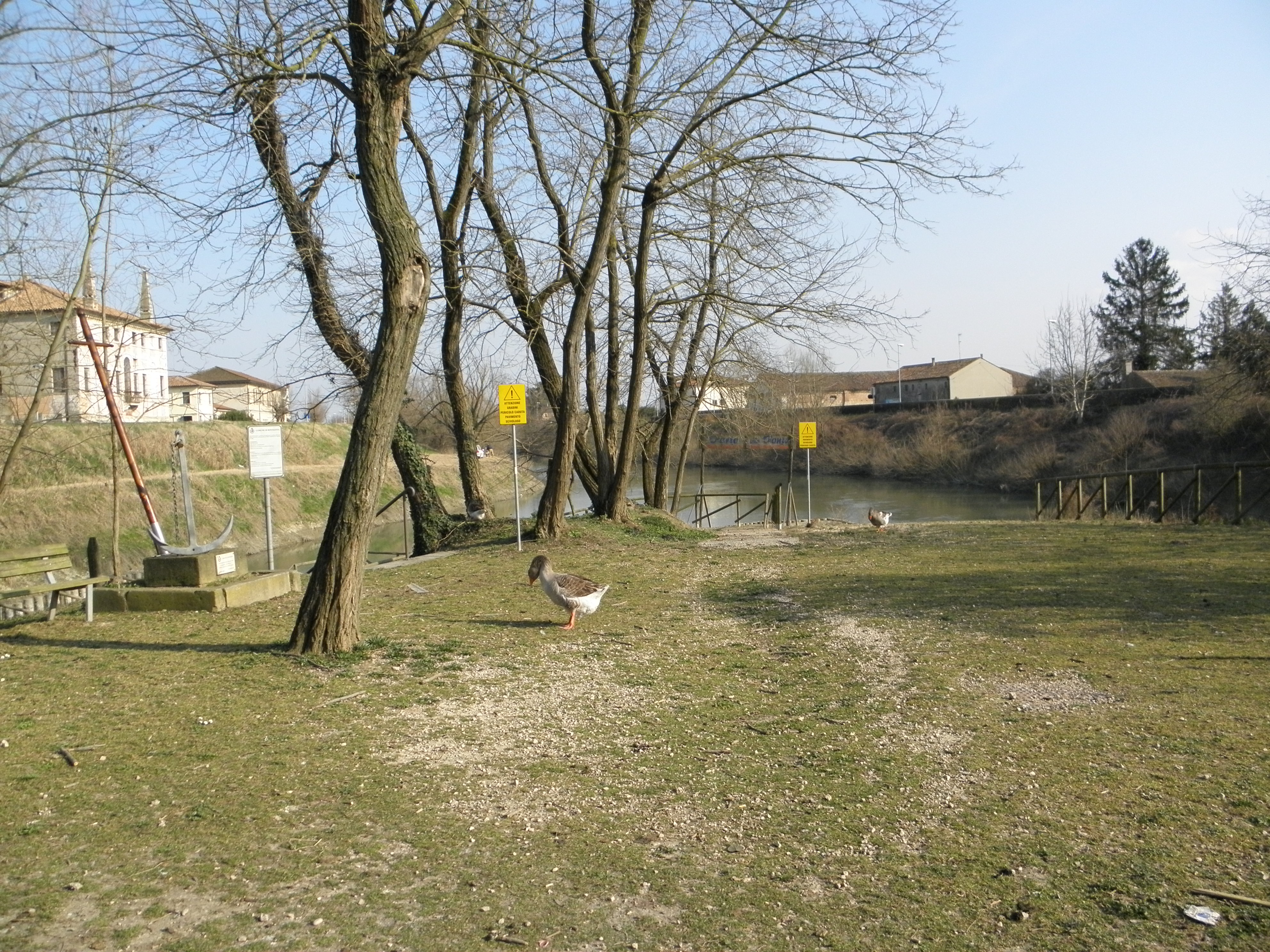 Bovolenta, il lembo di terra con attracco fluviale (nascosto) alla confluenza del fiume Bacchiglione, a nord e a sinistra nella foto, e il canale Vigenzone.